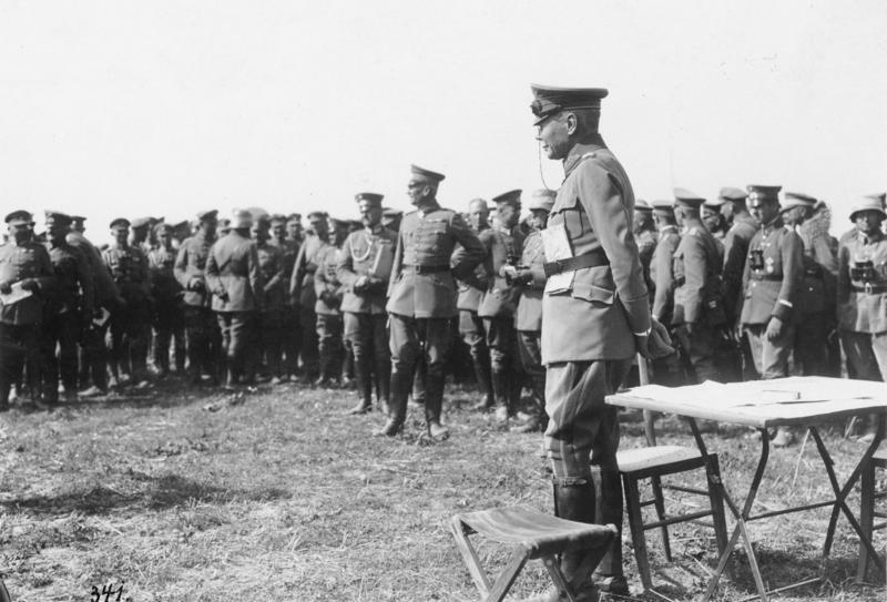 Gruppenmanöver der 5. und 7. Division in Bayer, Württemberg und Baden 1926 Chef der Heeresleitung, Generaloberst von Seeckt im Manövergelände (kurz vor Beginn der Kritik).